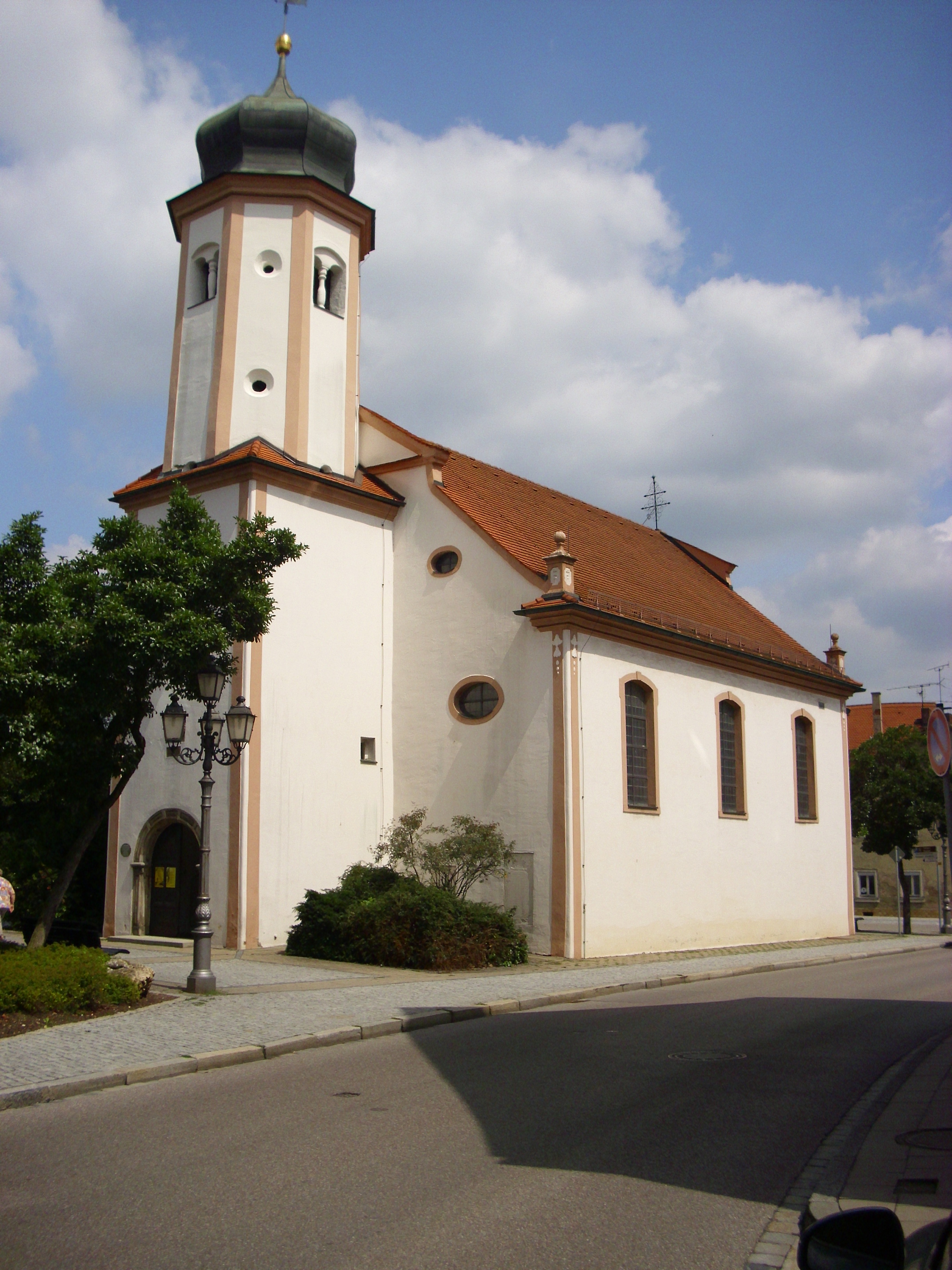 Die Lambertuskirche in Treuchtlingen über die Hauptstraße hinweg gesehen